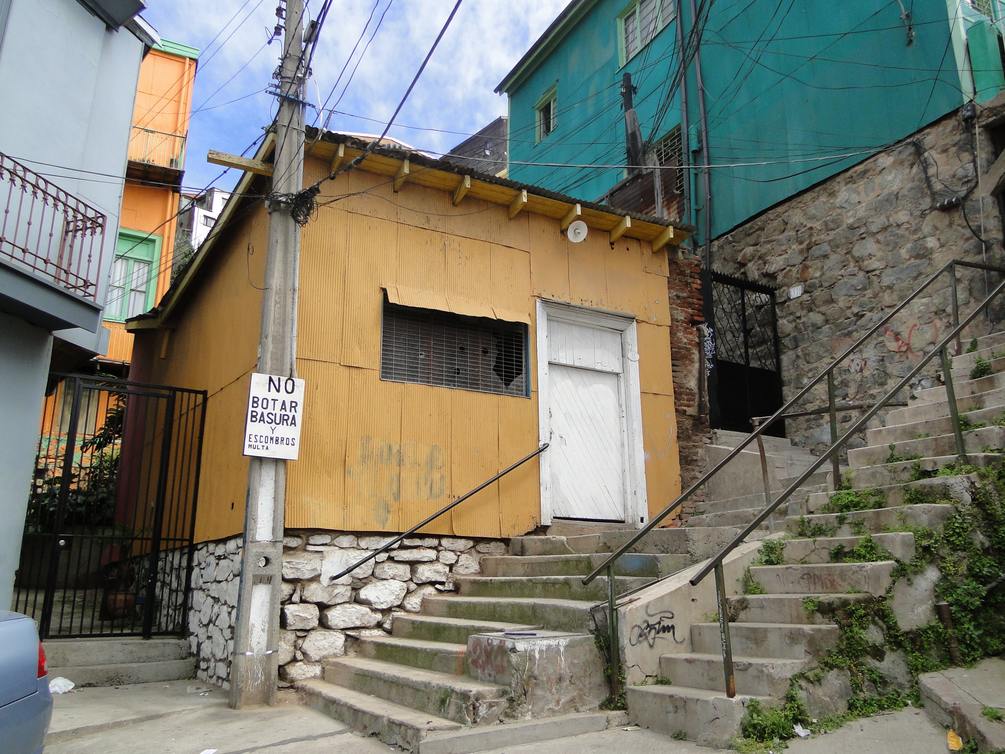 Ascensor Mariposas This is a photo of a national monument in Chile: 771